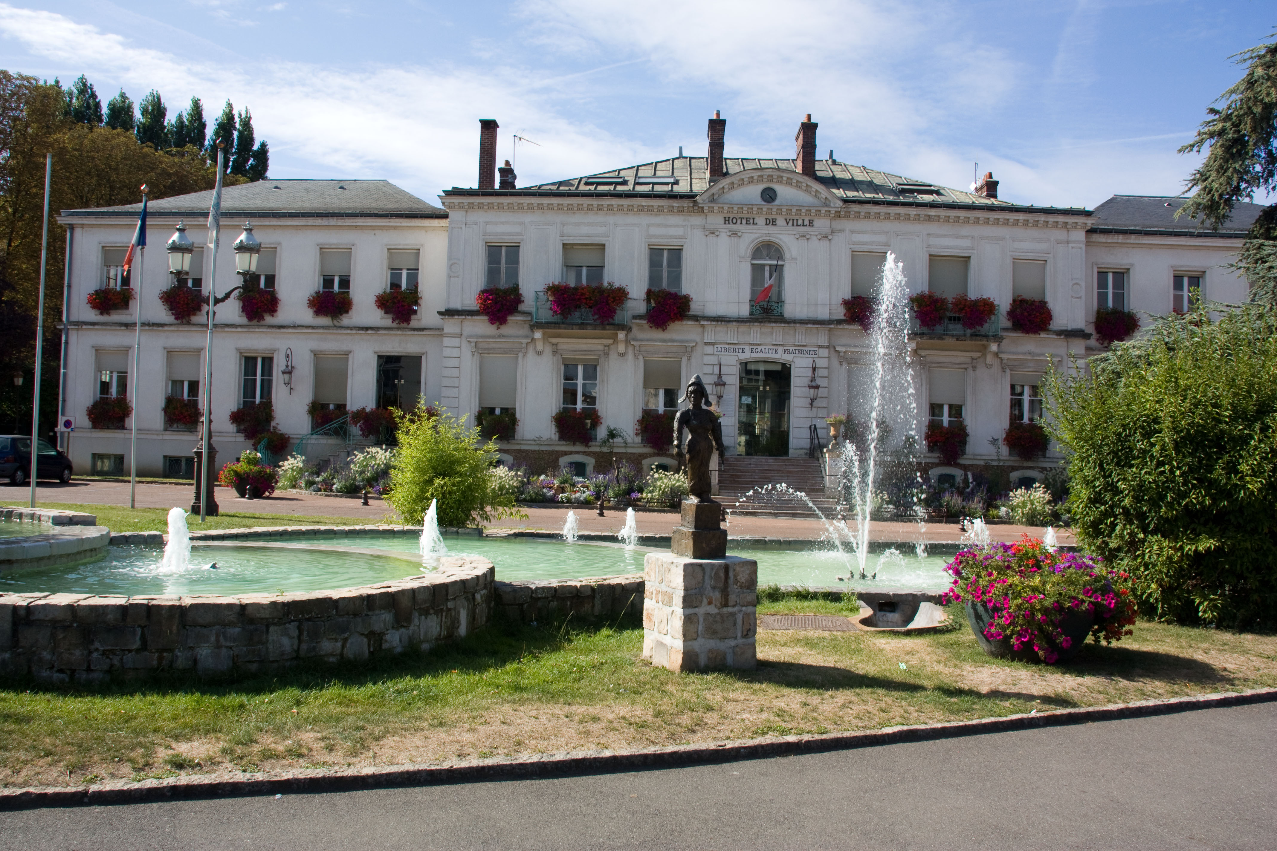 Mairie de Viry-Châtillon, Viry-Châtillon, Essonne, France